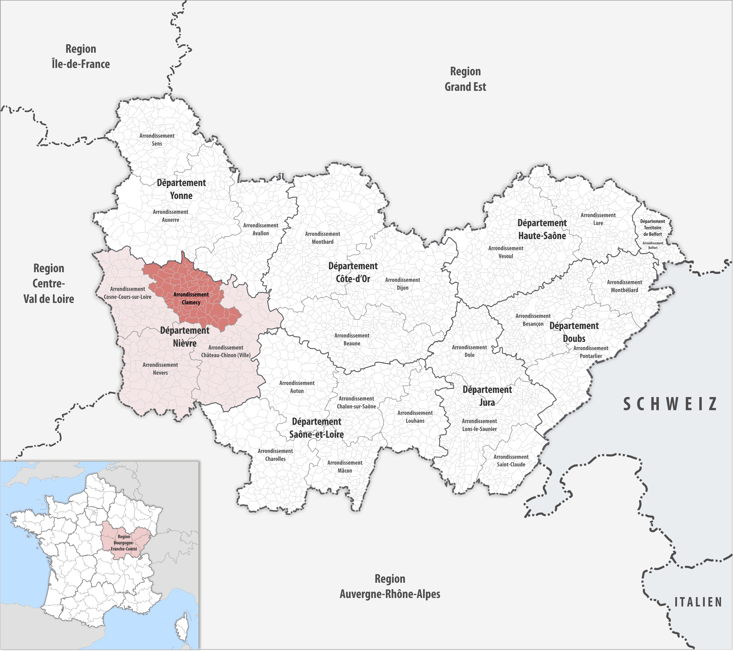 Lage des Arrondissements Clamecy